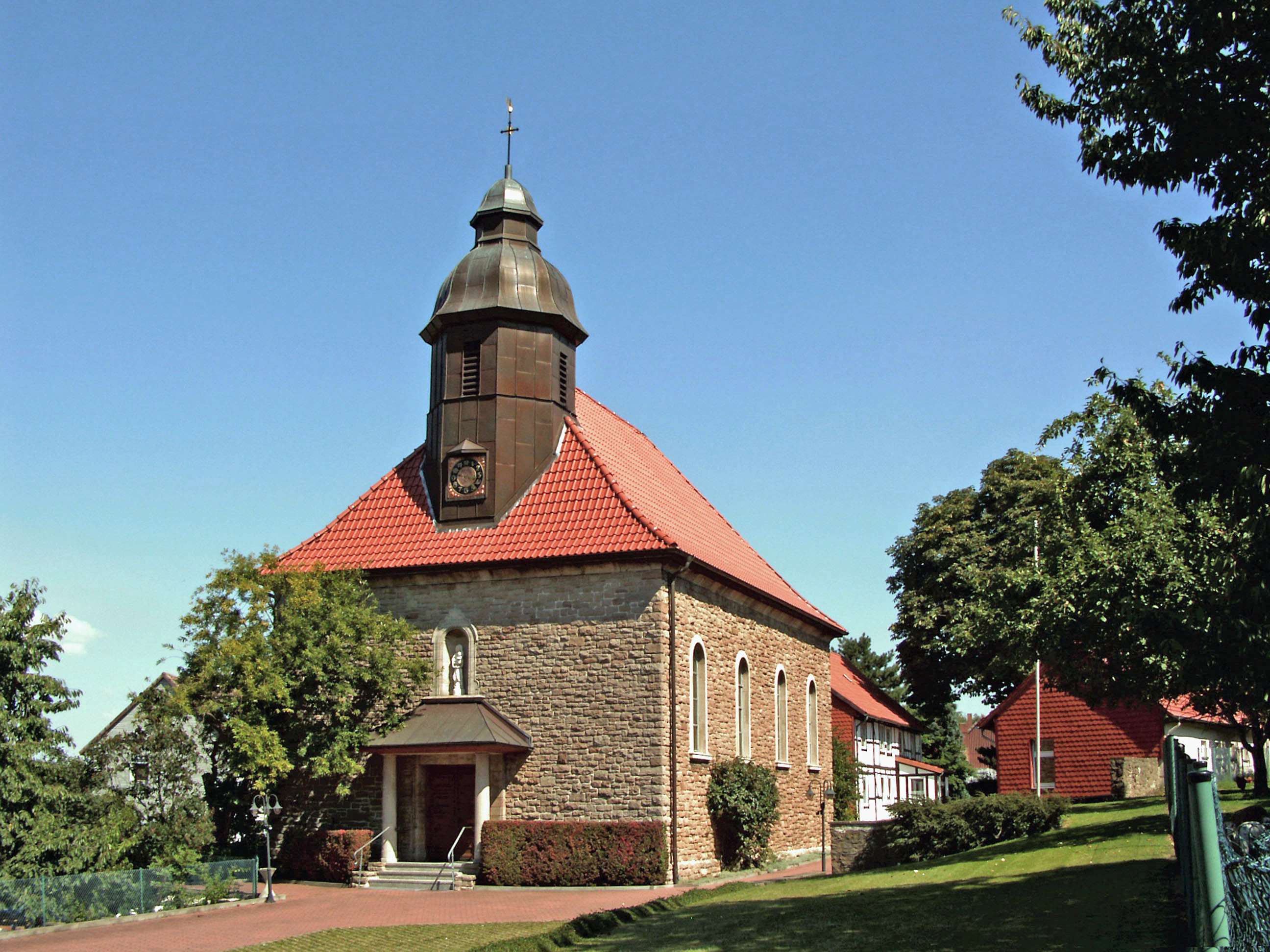 Katholische Kirche Maria von der Immerwährenden Hilfe in Jerxheim, Landkreis Helmstedt